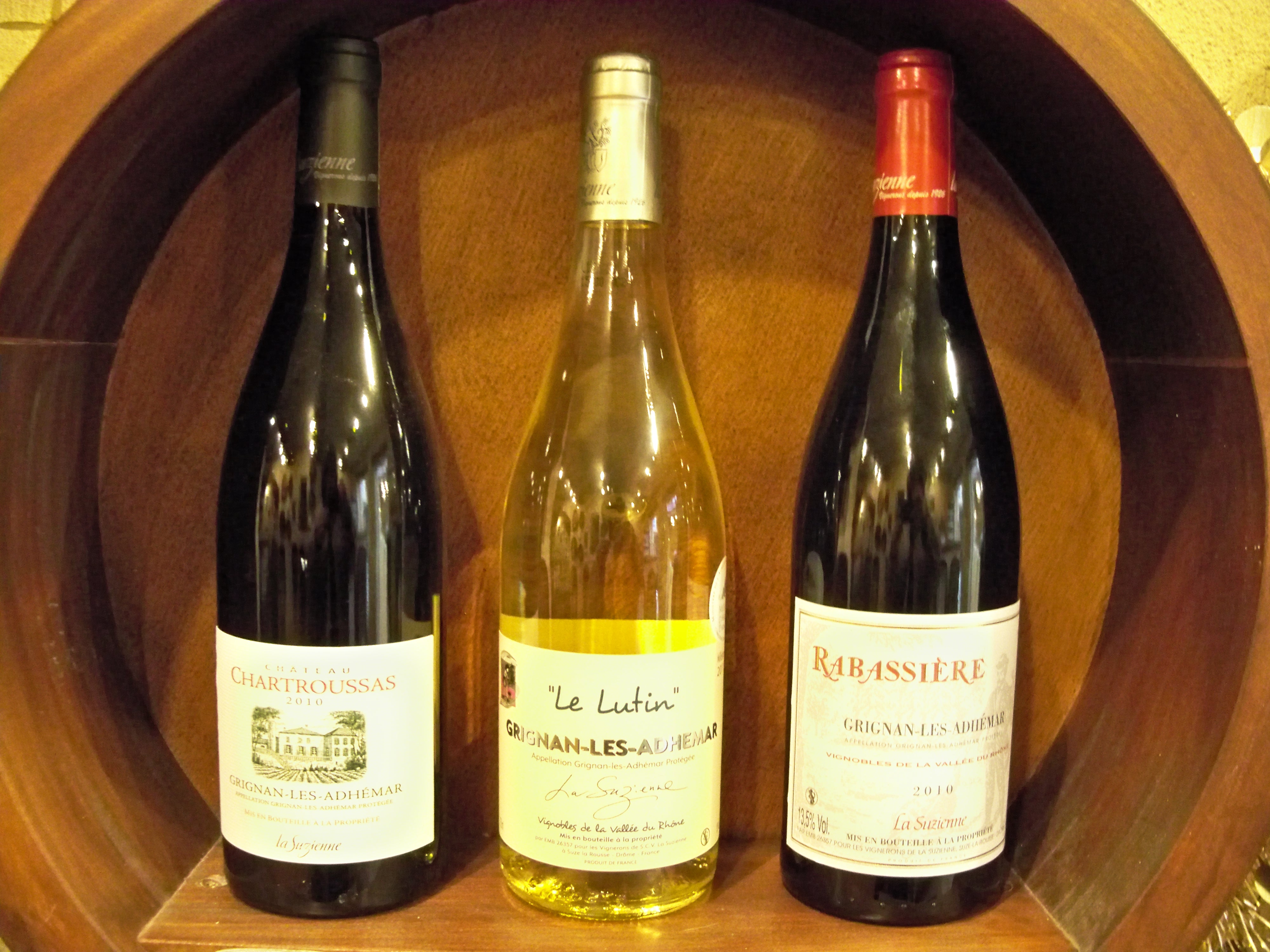 Maison de la Truffe de Saint Paul Trois Chateaux (26)